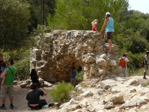 Alon Valley part of Oren Wadi. Mount Carmel, Israel בקעת אלון היא בקעה באפיק נחל אורן בהר הכרמל . הבקעה משתרעת מזרחית לעספיא ותחילתה באזור בו נשפך נחל חיק לנחל אורן שרידי טחנת קמח שראשיתה כנראה בתקופה הצלבנית